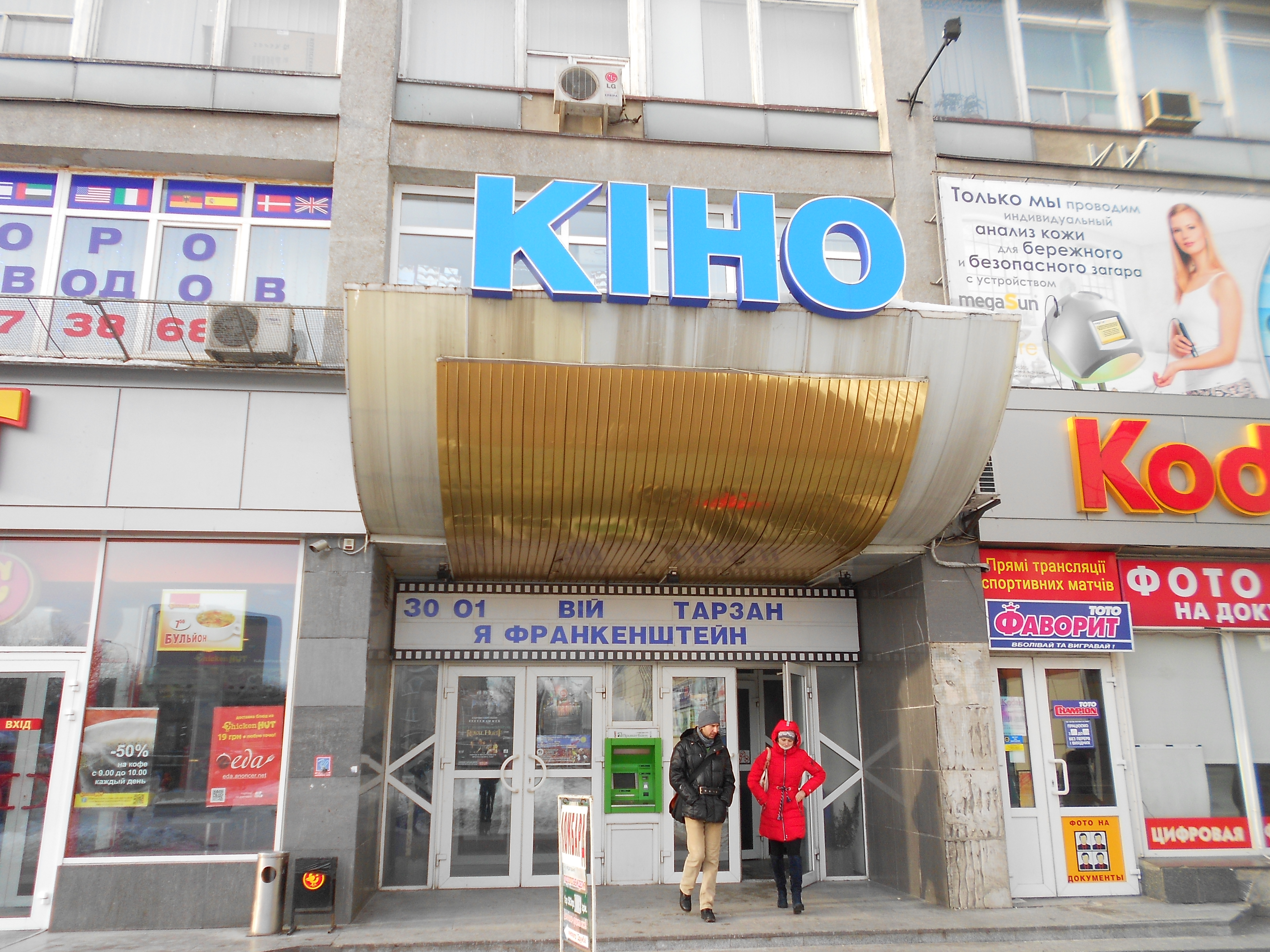 Кінотеатр Дружба Чернігів 2014